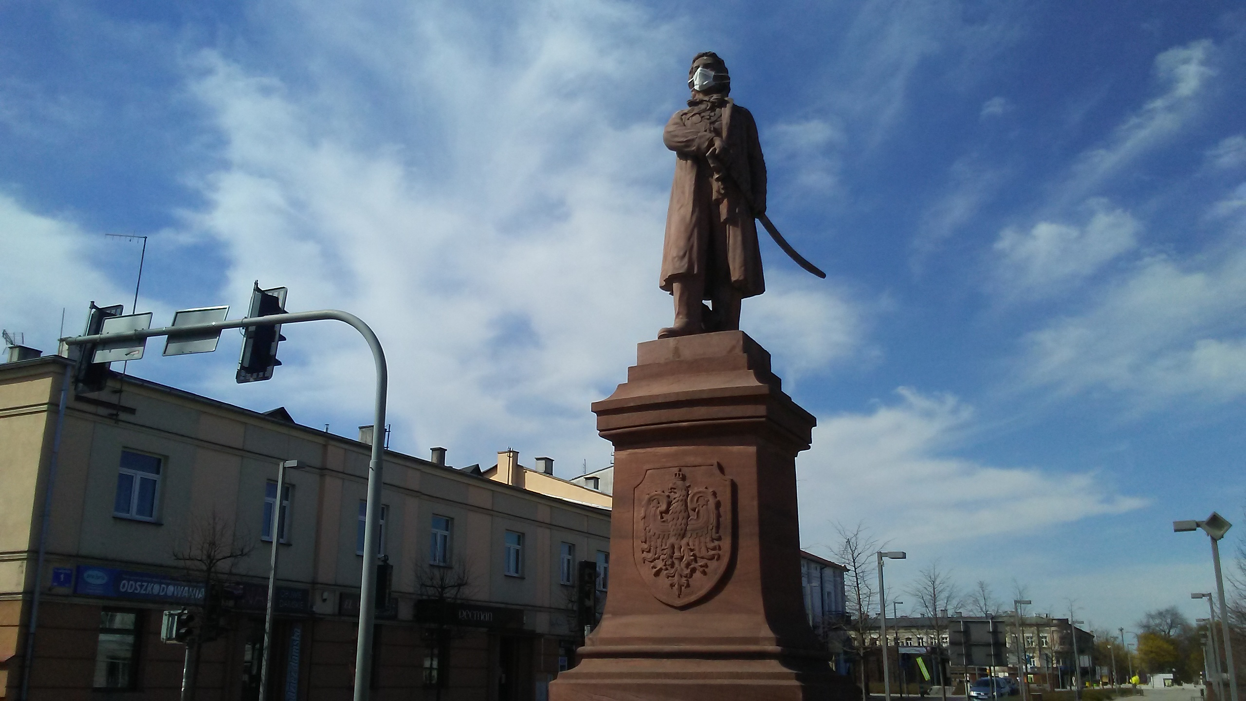 Pomnik Tadeusza Kościuszki na głównym placu Tomaszowa Mazowieckiego podczas pandemii SARS-CoV-2